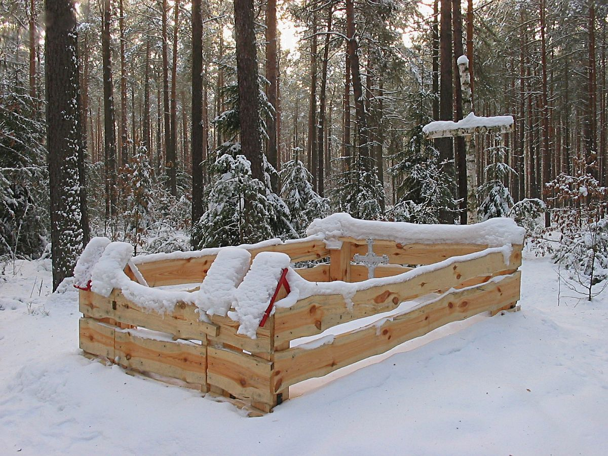 Mogiła powstańców styczniowych w Kierzu Niedzwiedzim